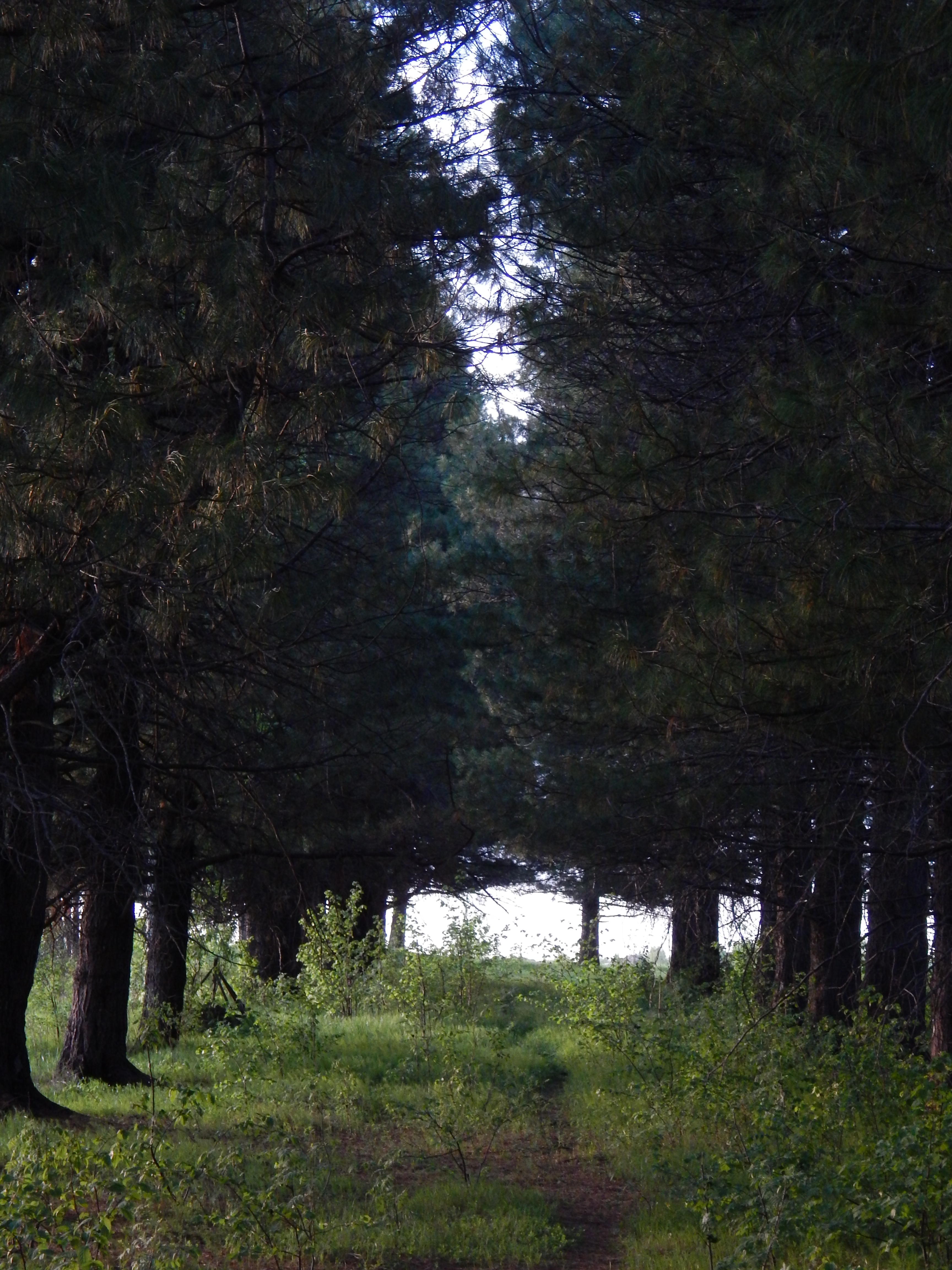 Заякинская кедровая роща: Игринский район, Удмуртия This image is related to the protected area of Russia number 1810046